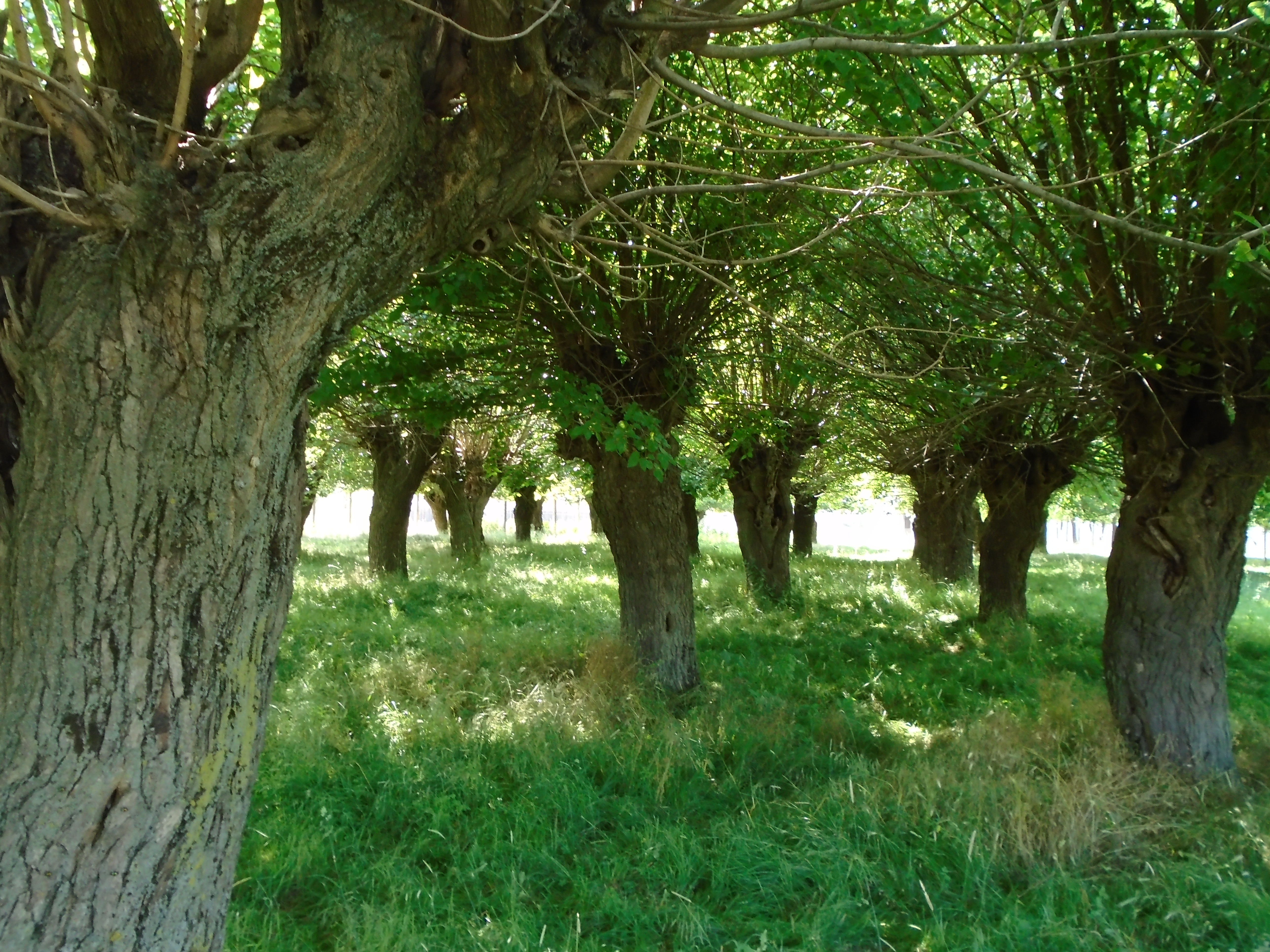 Livada didactică de duzi a Fermei-școli de agricultură, înființată de Domnitorul Carol I în 1867.